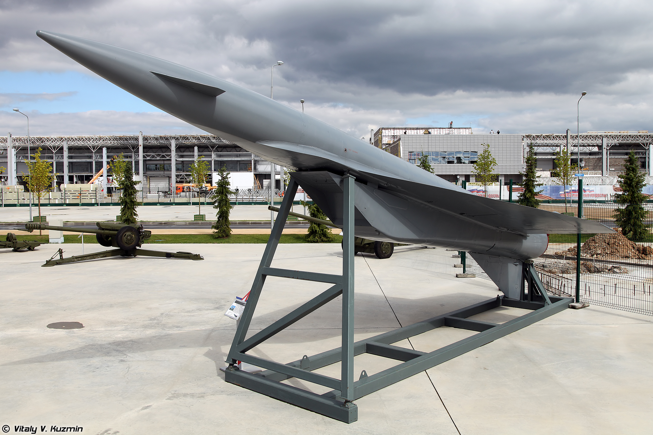 КР 3М25 Метеорит-А